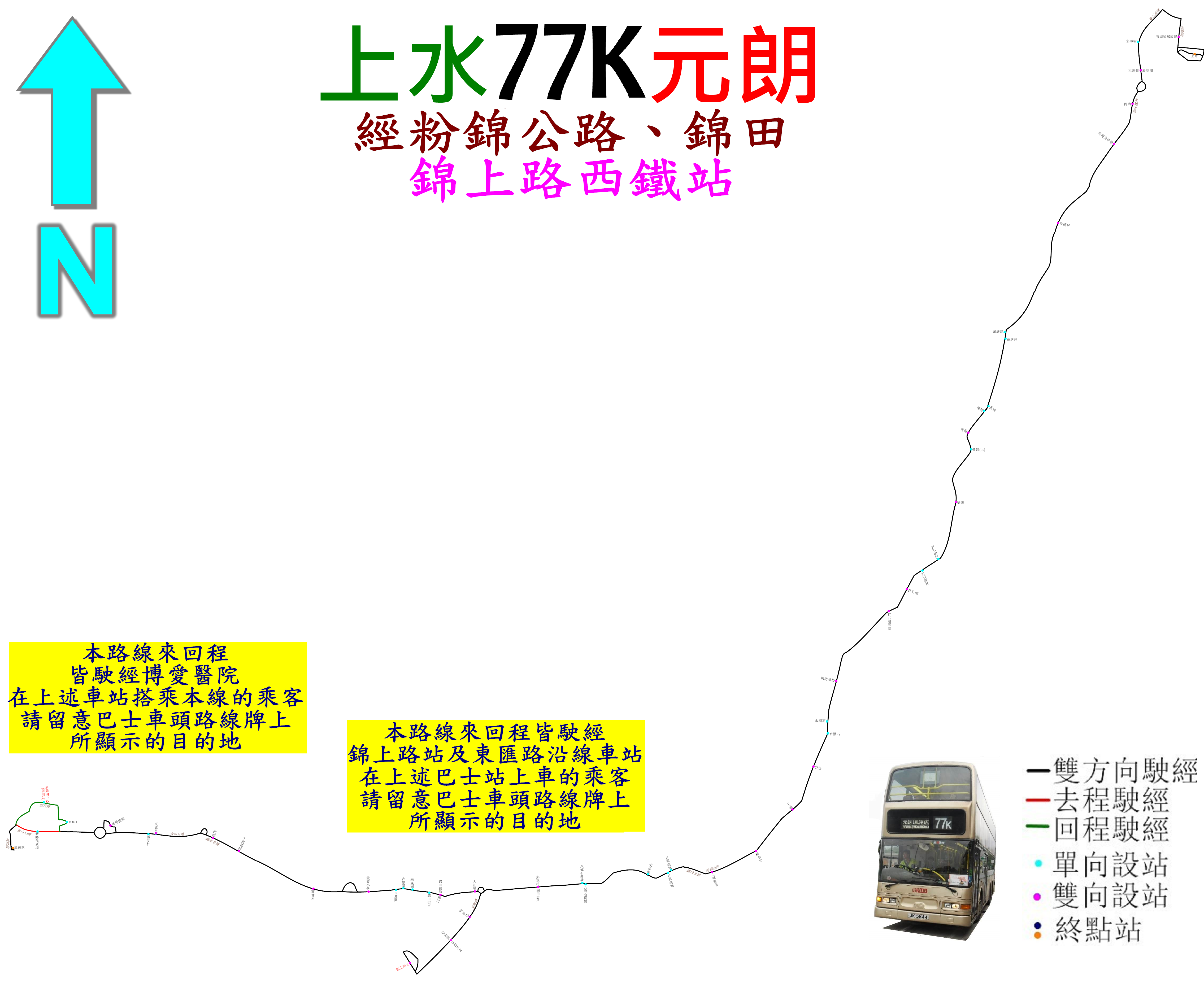 中文（香港）: 九巴77K線的走線圖